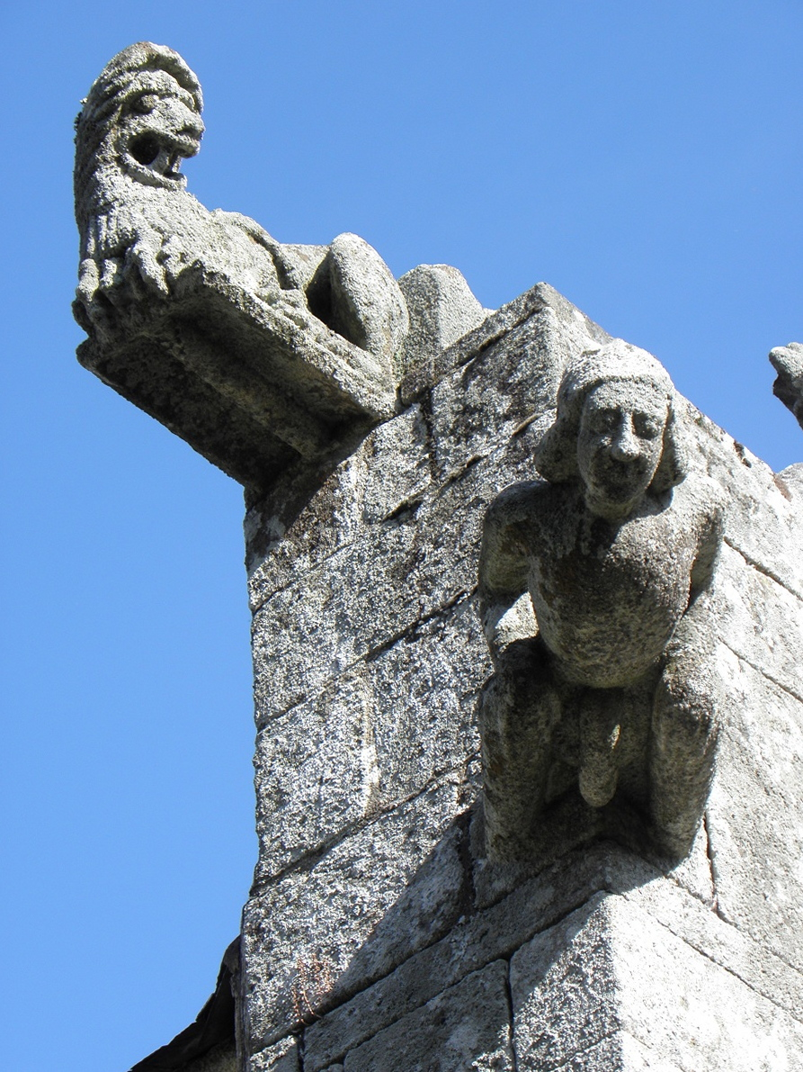 Amortissement de pignon de la chapelle Notre-Dame-des-Trois-Fontaines en Gouézec (29).